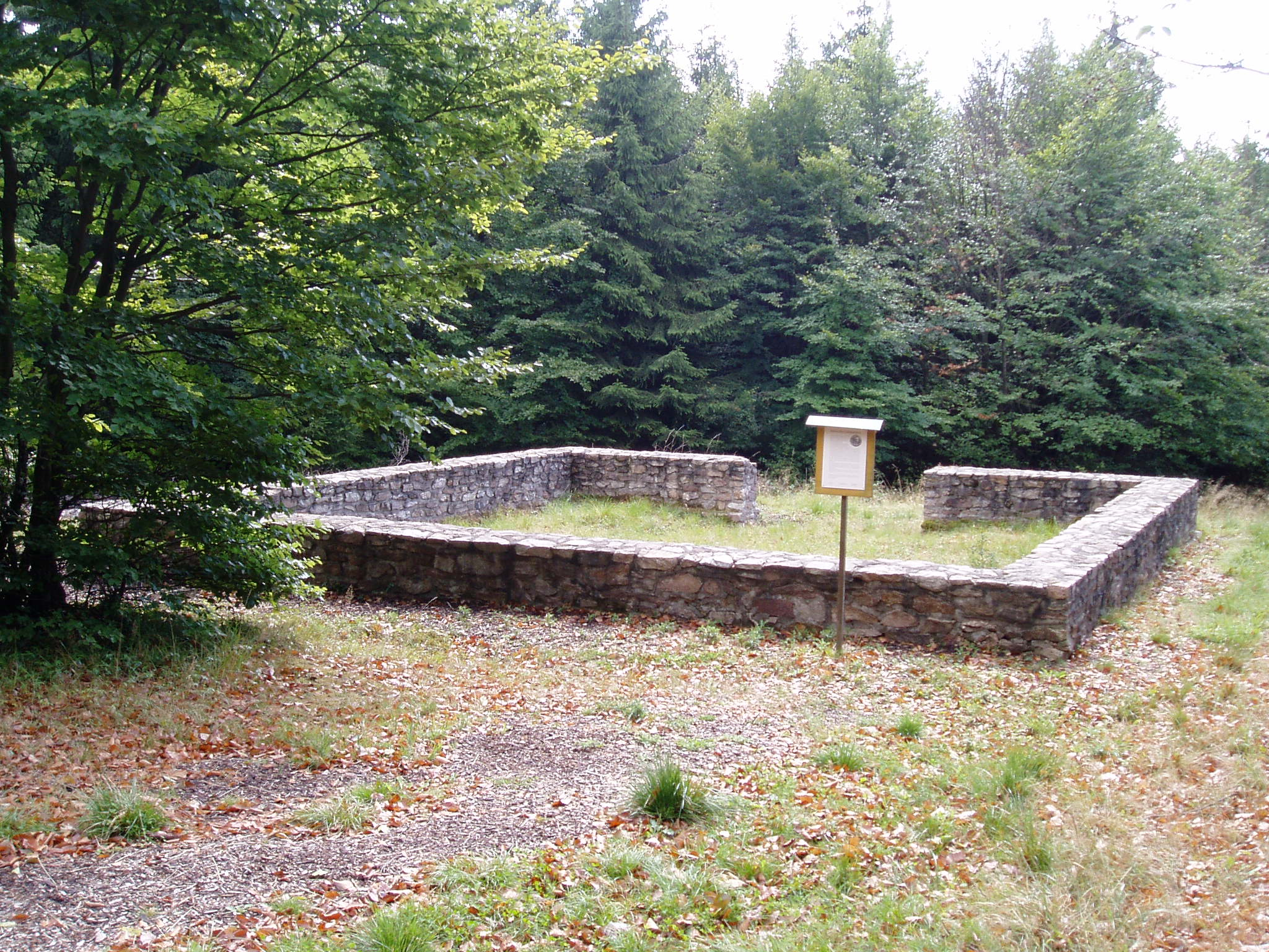 Römischer Gebäuderest im Bingerwald